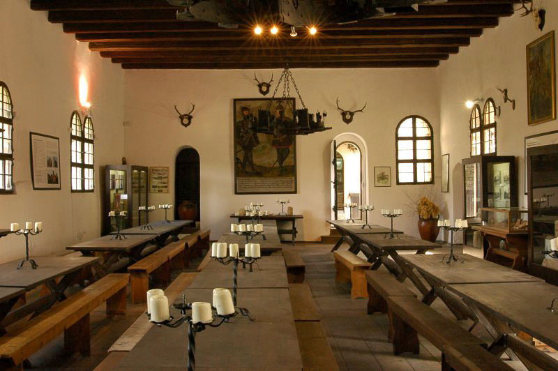 Hardegg castle